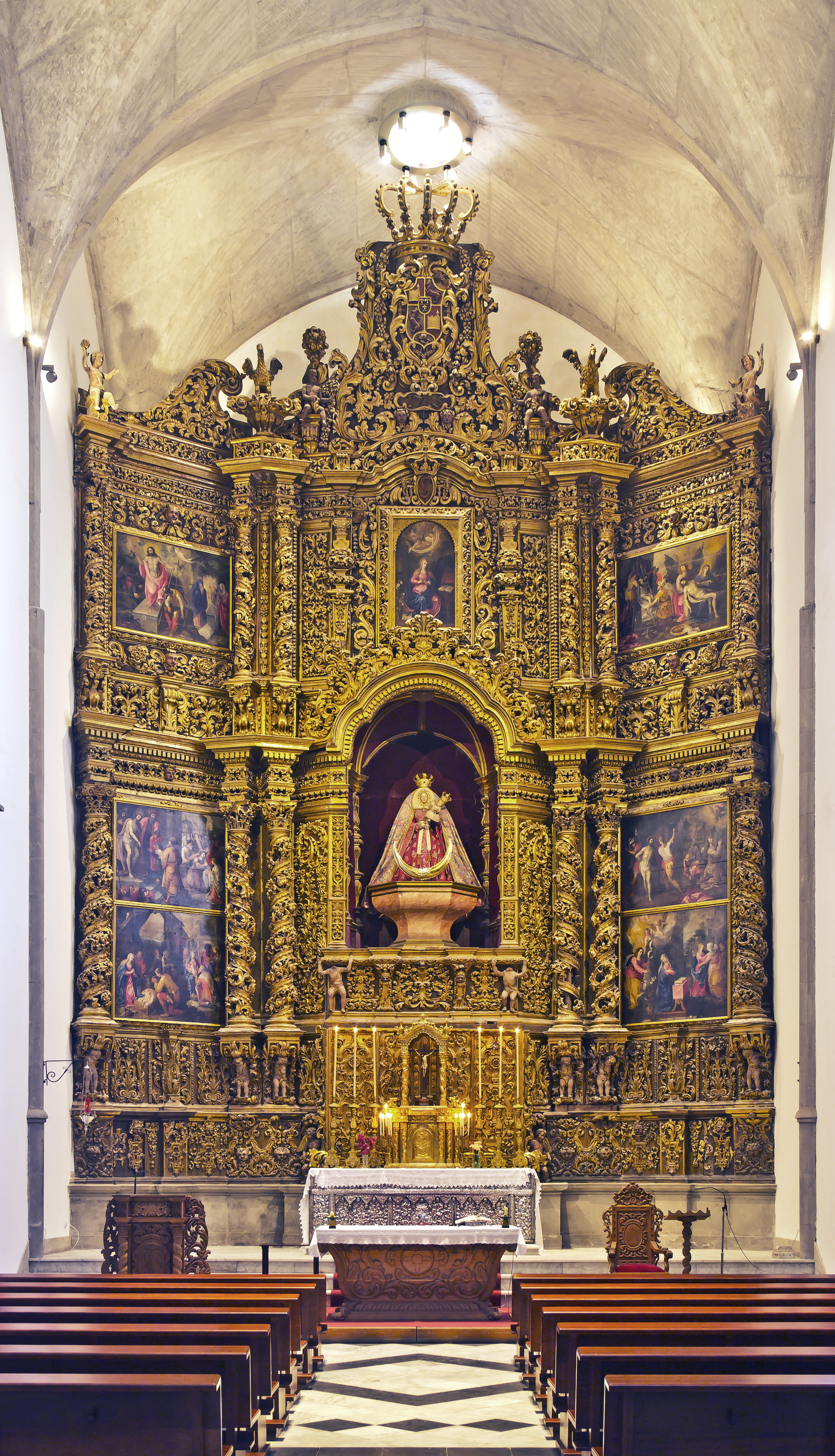 Retablo de la Virgen de los Remedios der Kathedrale in La Laguna